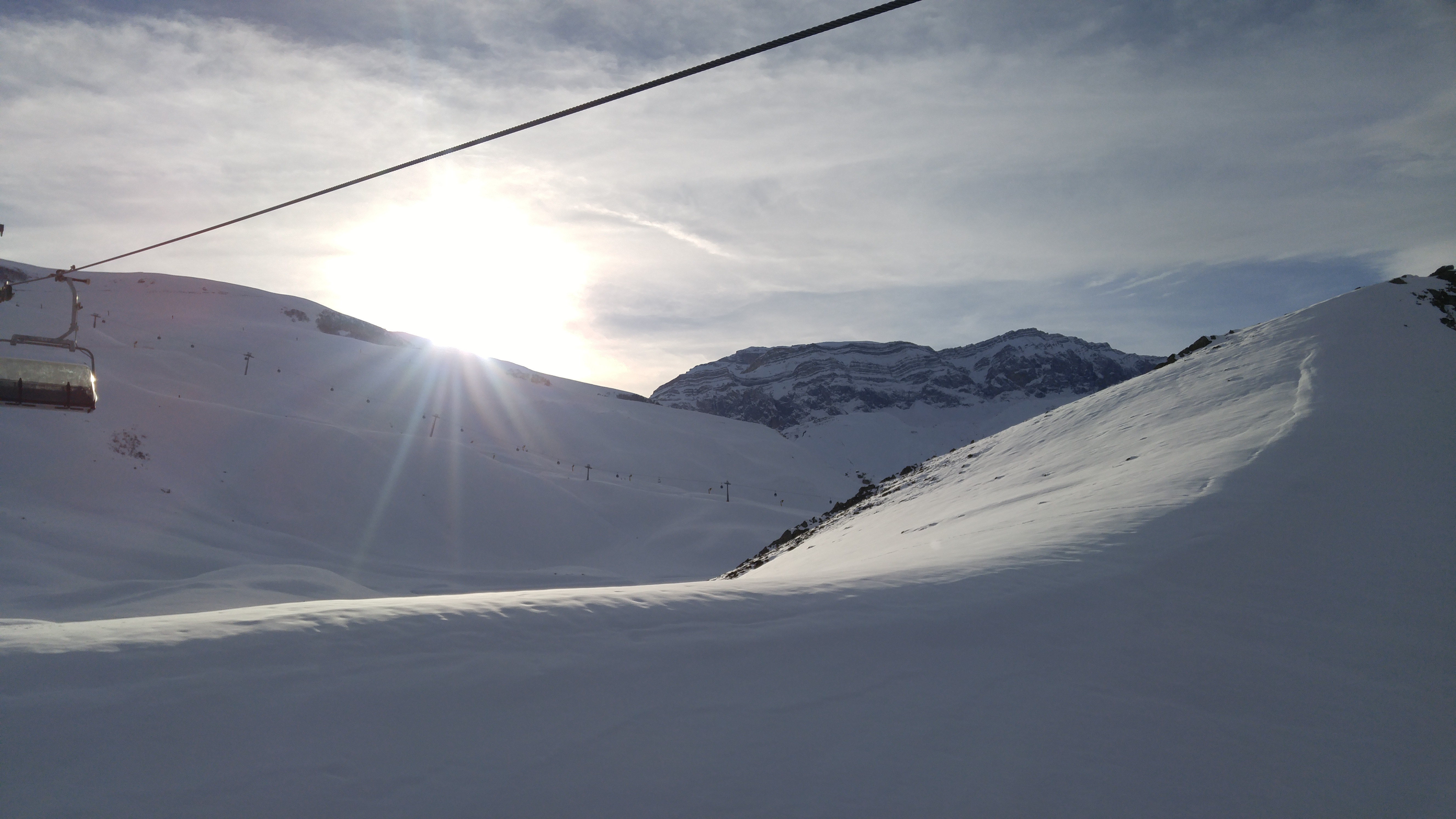 Qusar, Azerbaijan